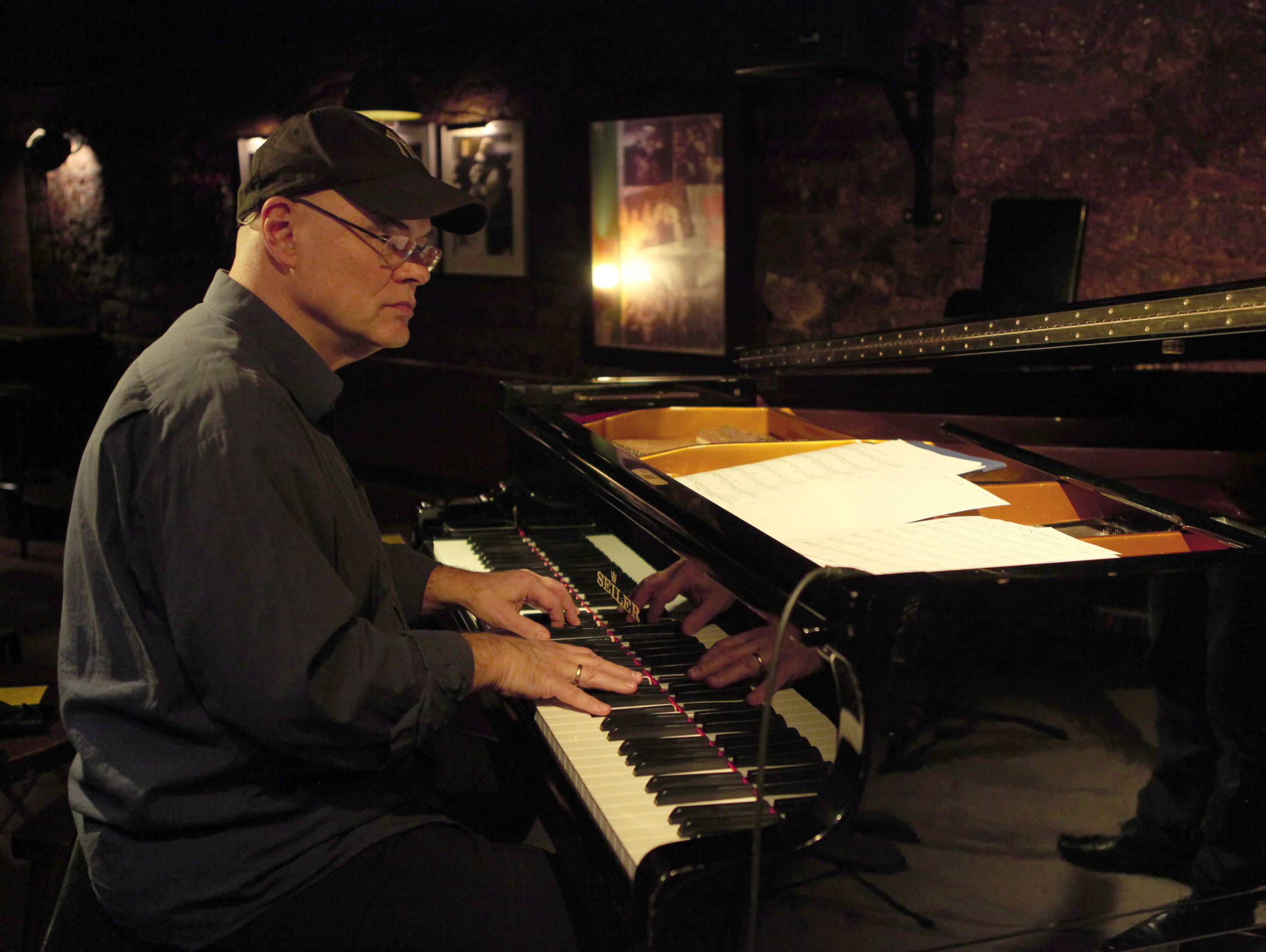 Christoph Spendel im Jazzkeller Frankfurt